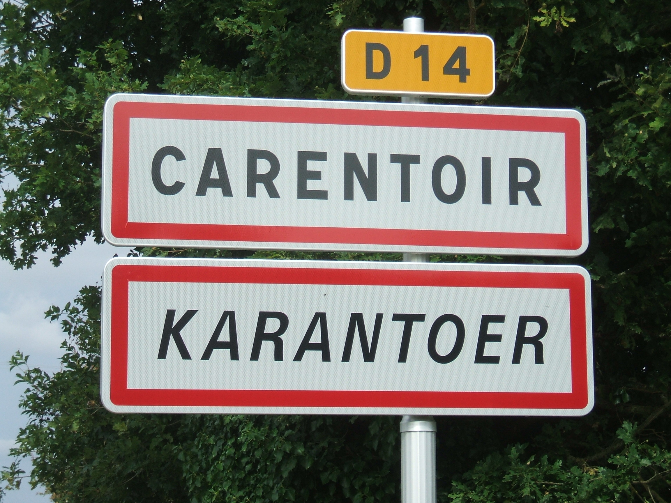 panneau bilingue français-breton carentoir